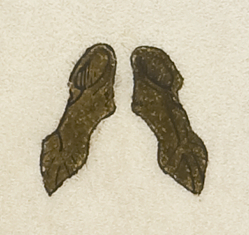 Hs. 400, f. 28v. Marge: Sandalen van een bisschop.